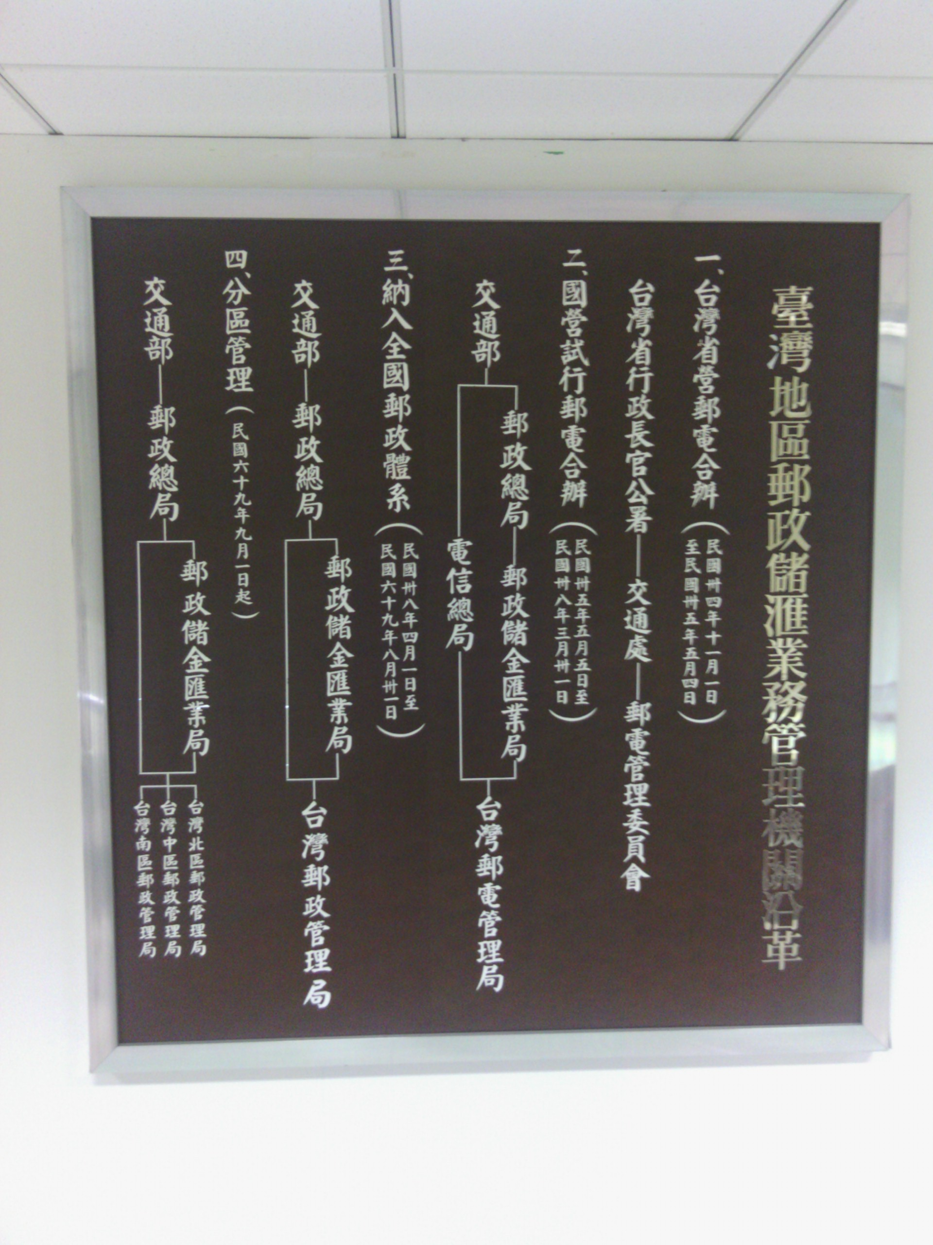 臺北市中正區重慶南路二段，郵政博物館展示的臺灣地區郵政儲匯業務管理機關沿革解說牌。